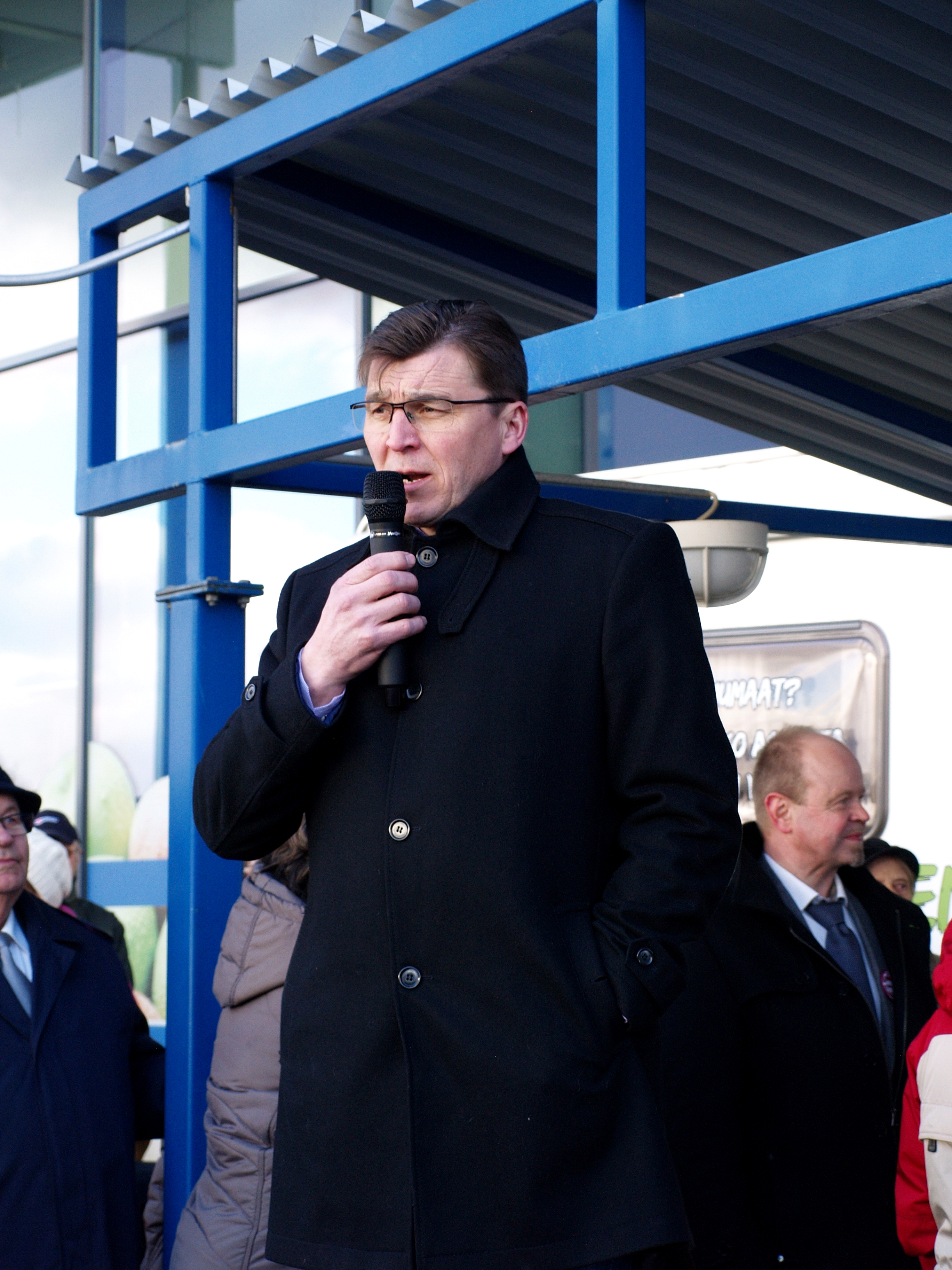 Keskustan eduskuntavaaliehdokas Seppo Pirttikoski puhumassa Lapualla, 2015.